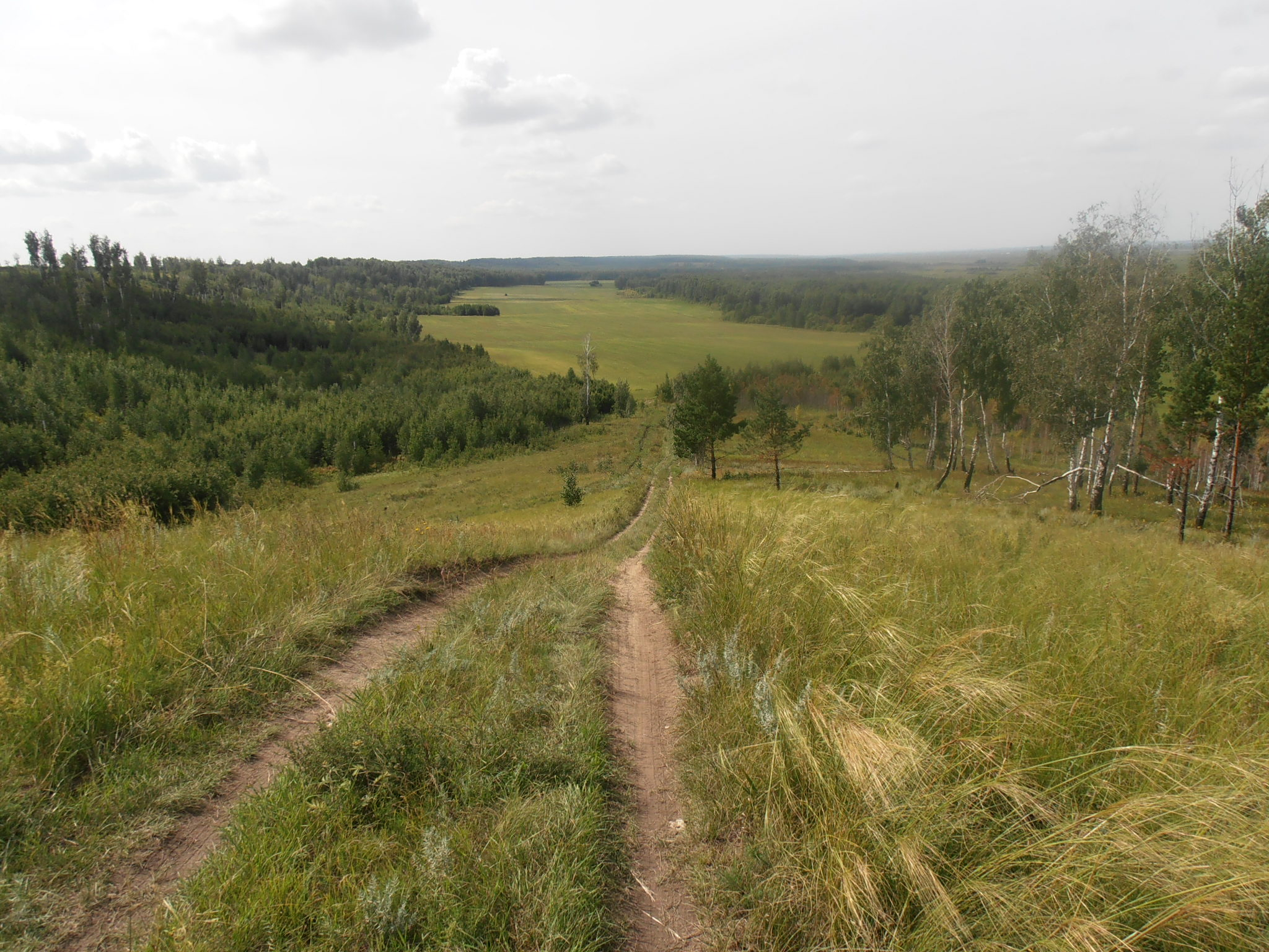 Пойма правого берега реки Исеть (Ингальская долина, Исетский район Тюменской области).